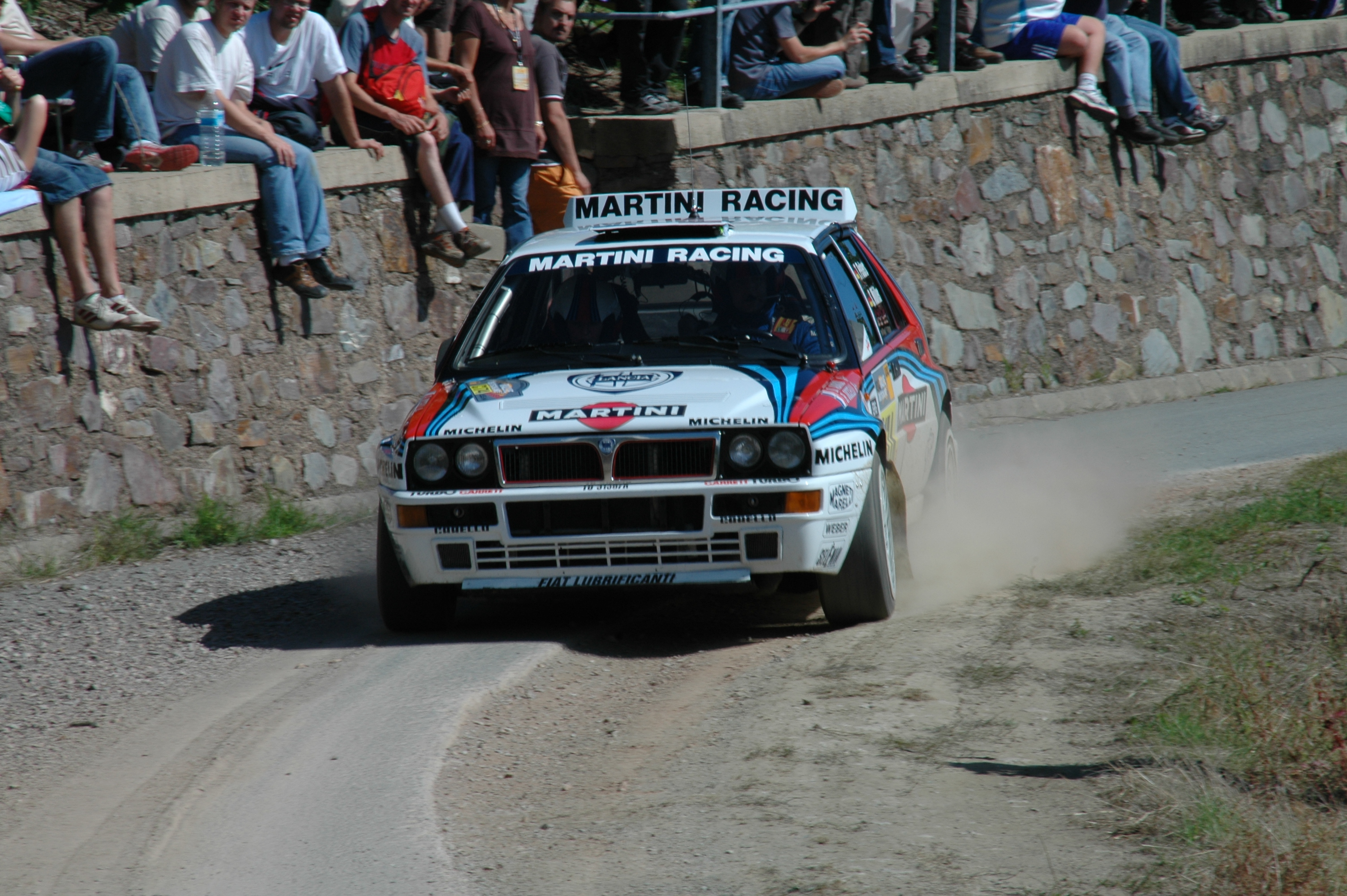 Lancia Delta Integrale driven during the 2007 Rallye Deutschland.